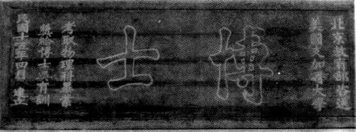 中文（台灣）: 吳有訓博士牌匾